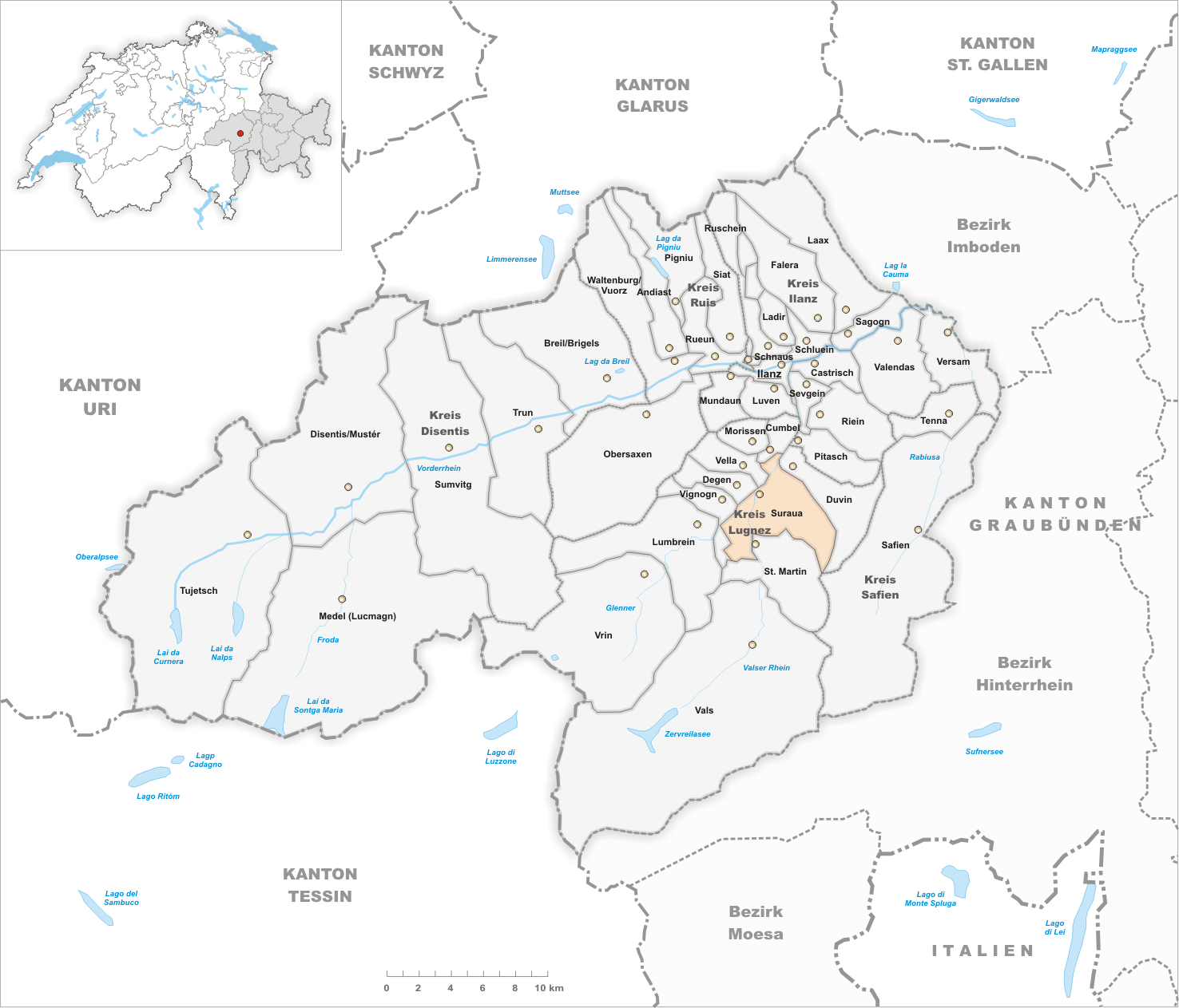 Municipality Suraua